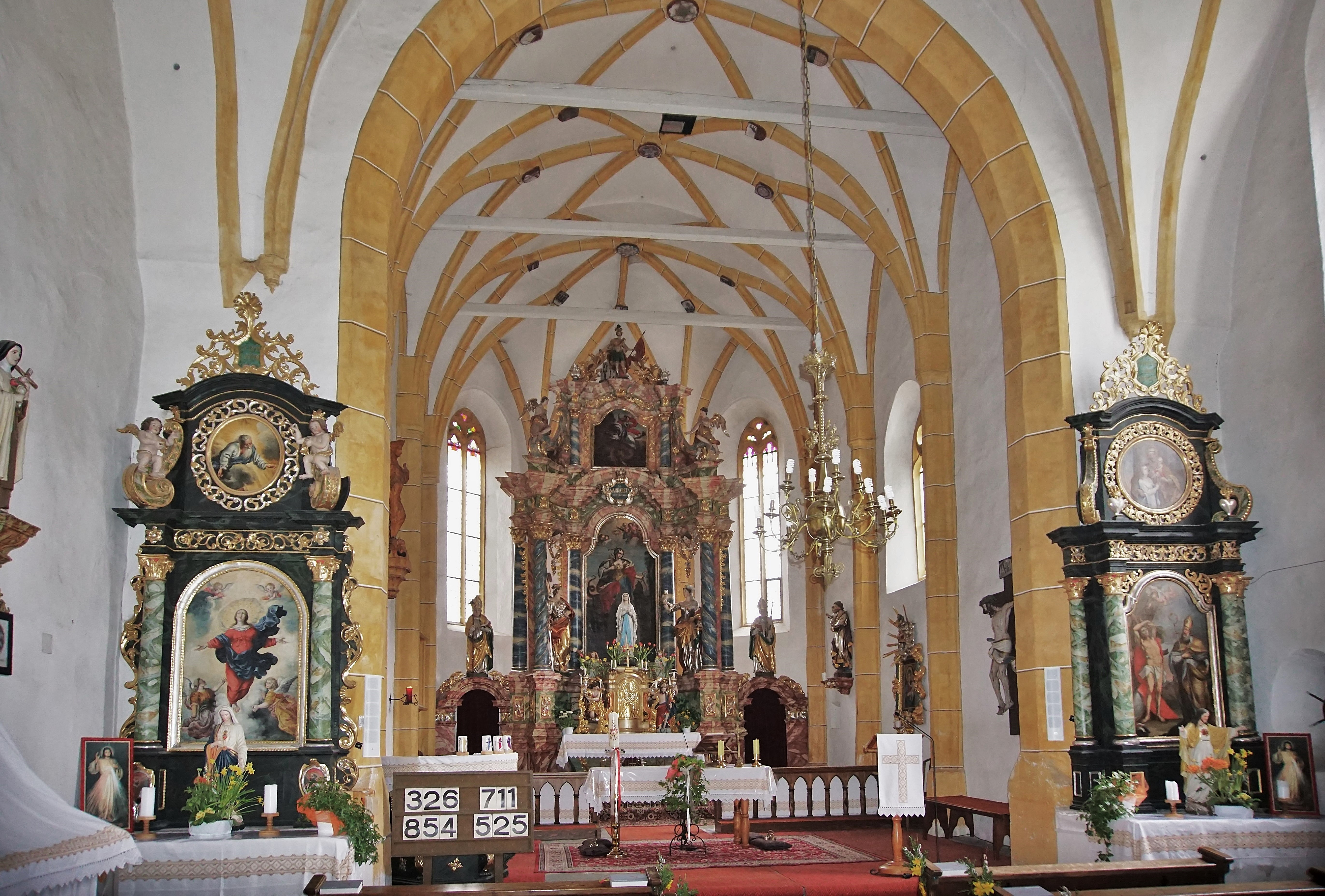 Kath. Pfarrkirche St. Margarethen (Ebene Reichenau), Innenansicht